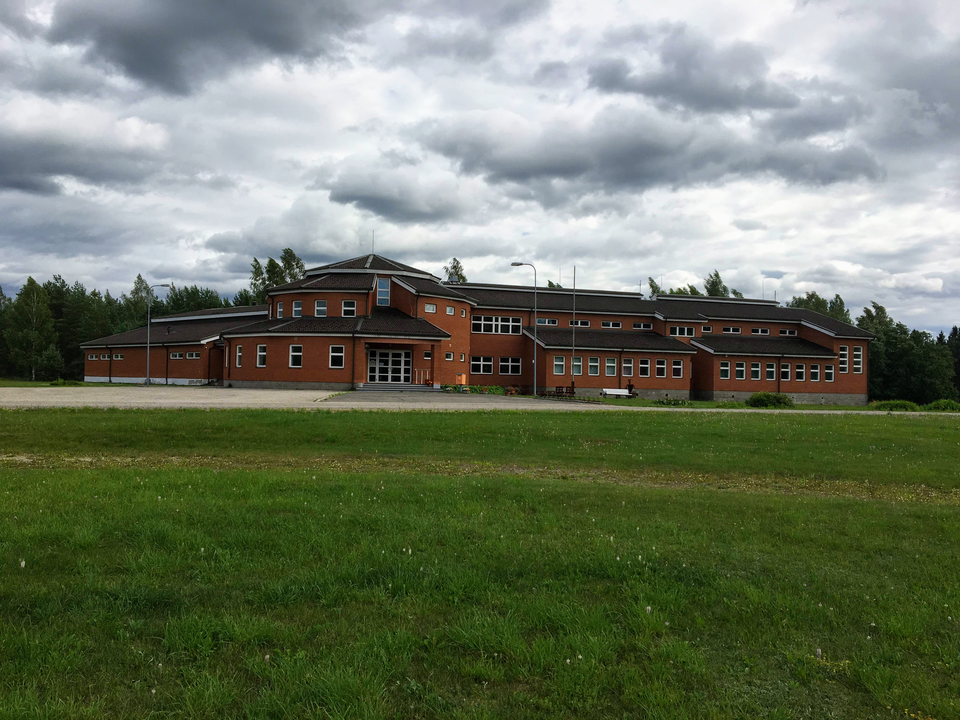 Krabi Kooli maja, juuni 2019.